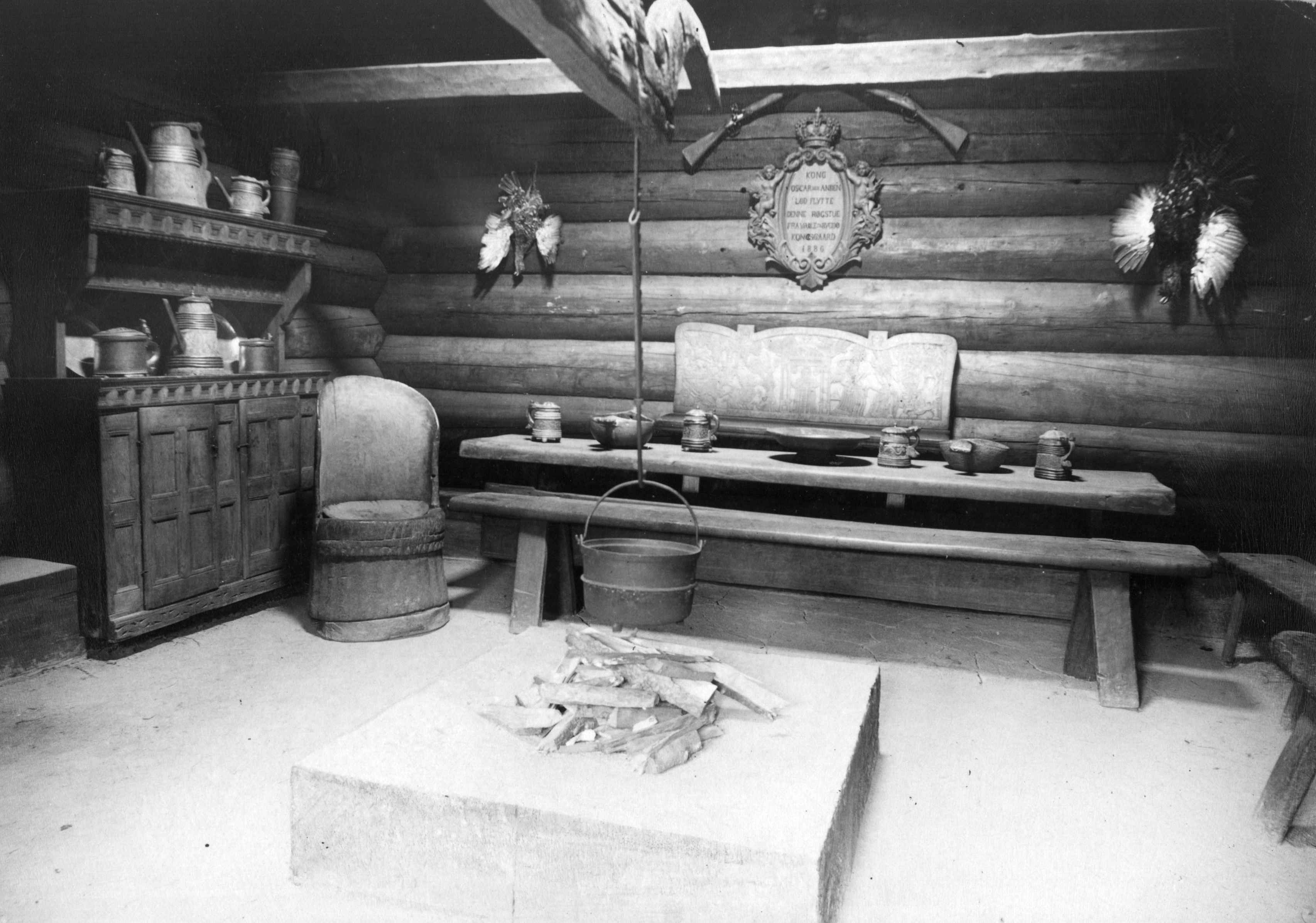 Intriør fra Kjellebergstua, Setesdalstunet på Norsk Folkemuseum, fotografert av Axel Lindahl mellom 1875 - 1896.